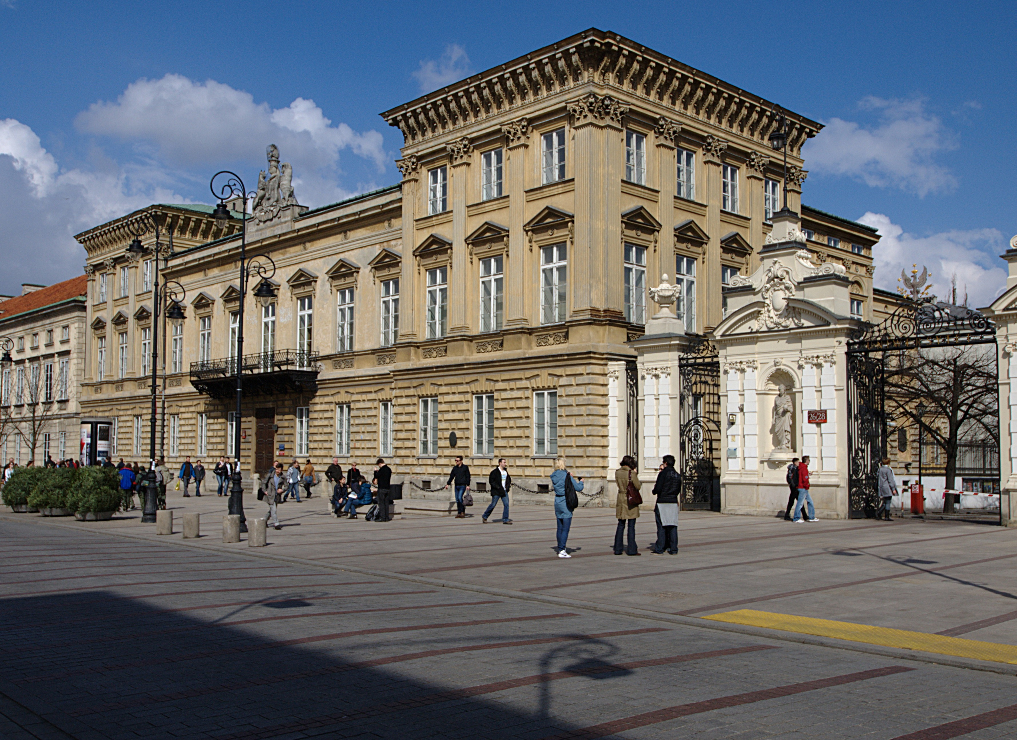 Pałac Uruskich.